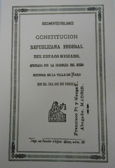 Portada de una copia fascimil de la Constitución Republicana Federal del Estado Riojano (España). Su publicación esta fechada en 1883.